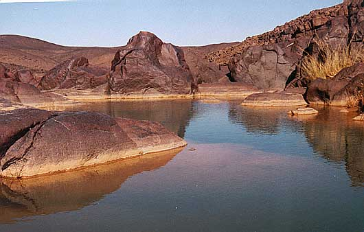 Auteur: Taguelmoust Une guelta, près d'Oubankort dans l'Adrar des Ifoghas. GFDL Taguelmoust janvier 2003 Catégorie:Image de Géomorphologie en milieu désertique chaud Catégorie:Image de Géomorphologie fluviale et lacustre